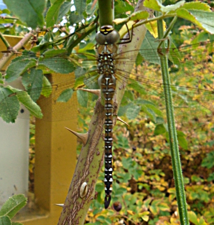 Blaugrüne Mosaikjungfer auf der Grünen Brücke (Mainz) im Juli 2015